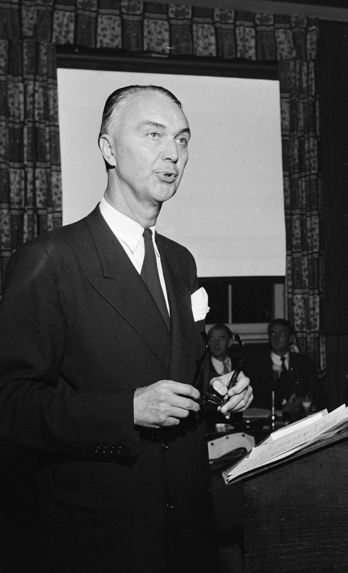 Forlagsdirektør i J.W. Cappelens Forlag, Henrik Groth.